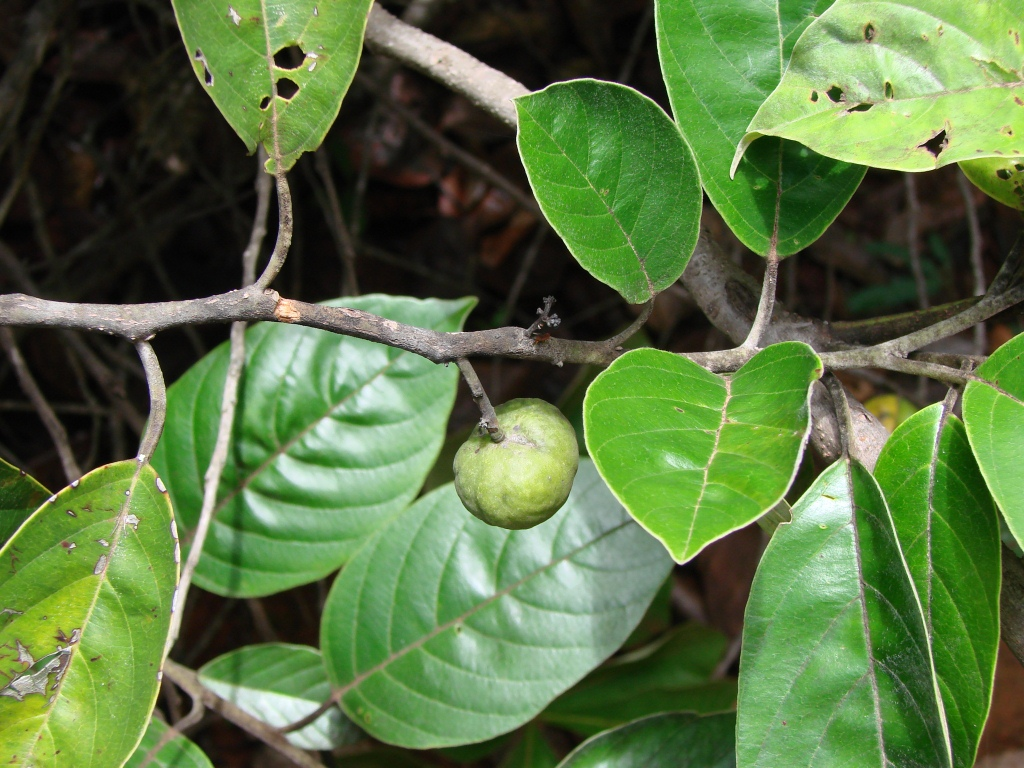 Emmotum nitens (Benth.) Miers - ICACINACEAE - Jardim Botânico de Brasília - Brasília - Distrito Federal - Brasil.